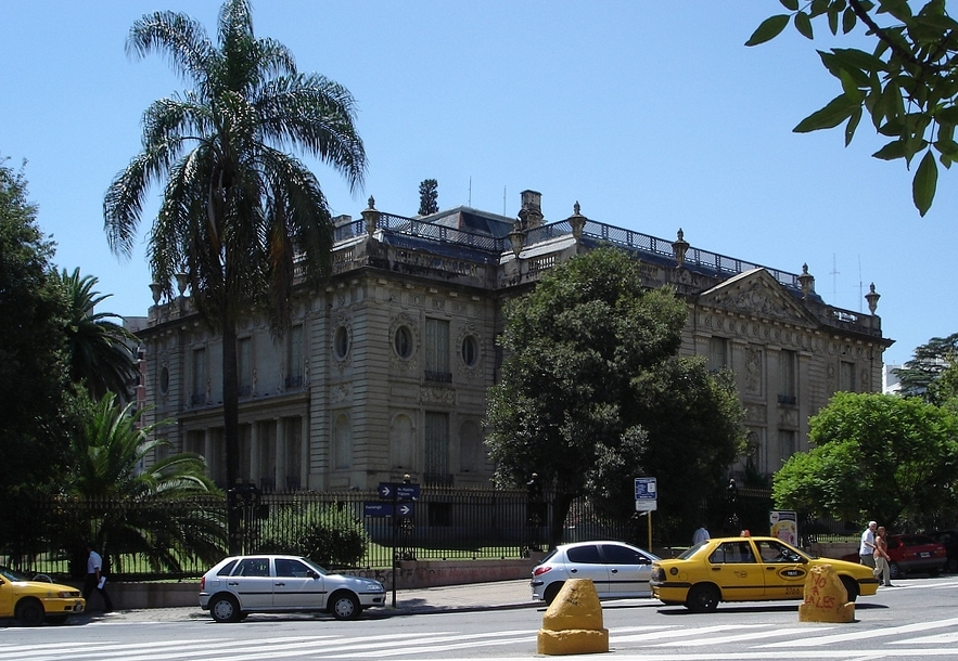 Palacio Ferreyra, Córdoba, Argentina